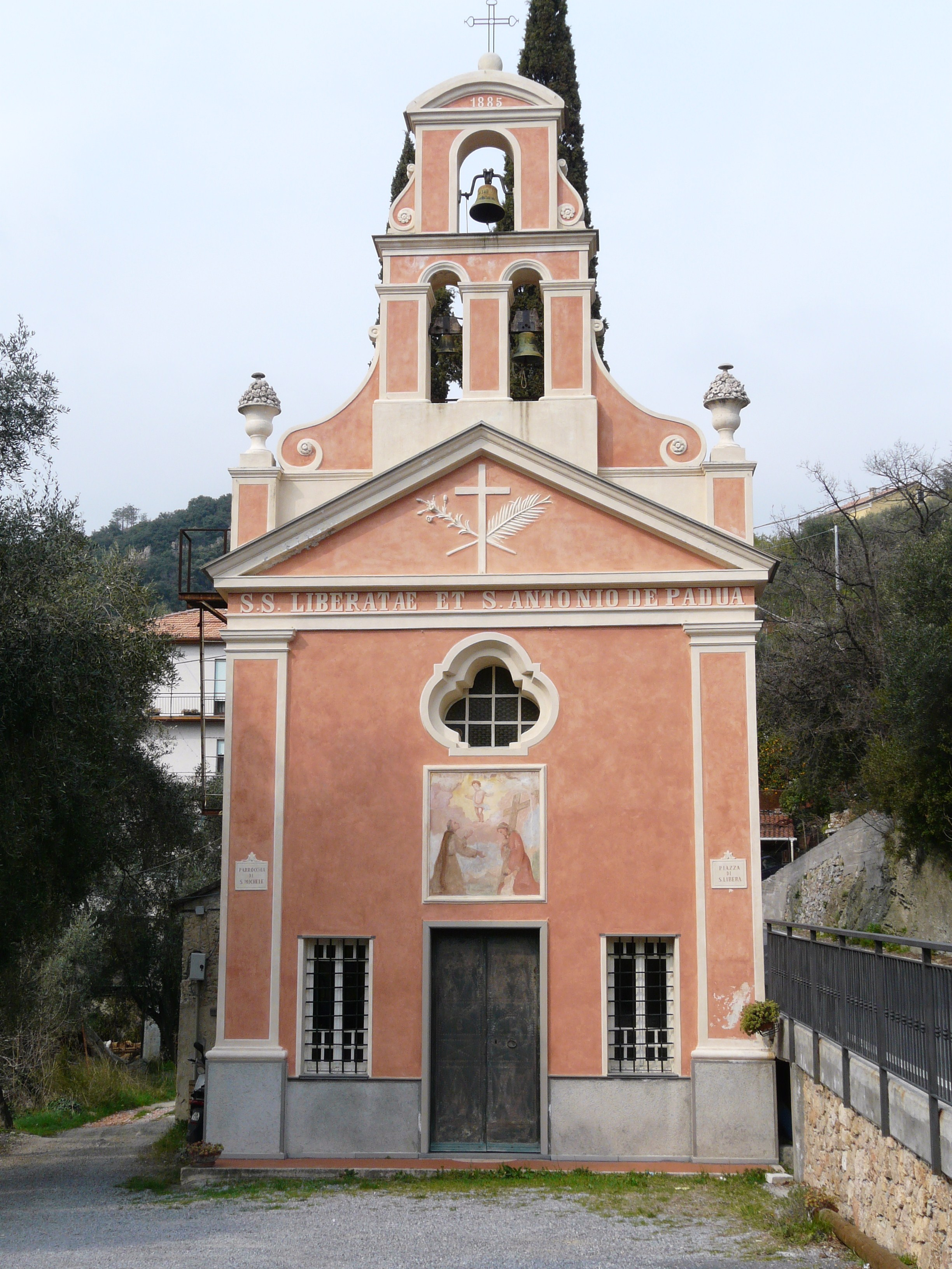 Cappella di Santa Libera, Giustenice, Liguria, Italia